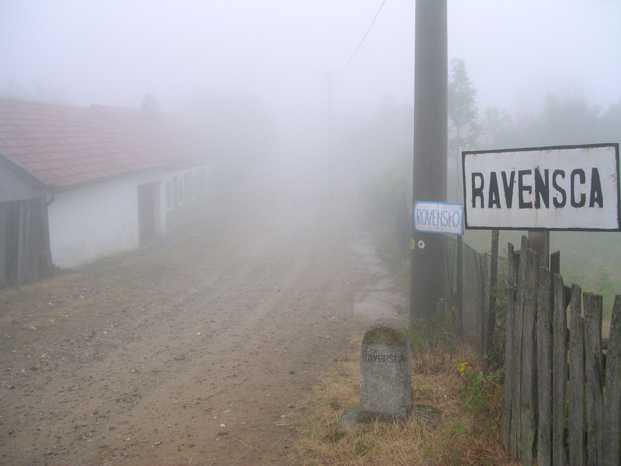 Ortstafel Ravenca/Rovensko